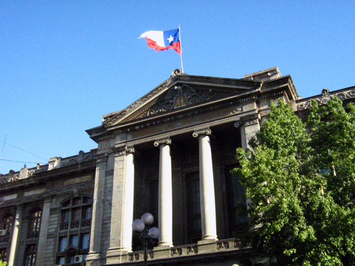 Palacio de Tribunales de Justicia de Santiago de Chile